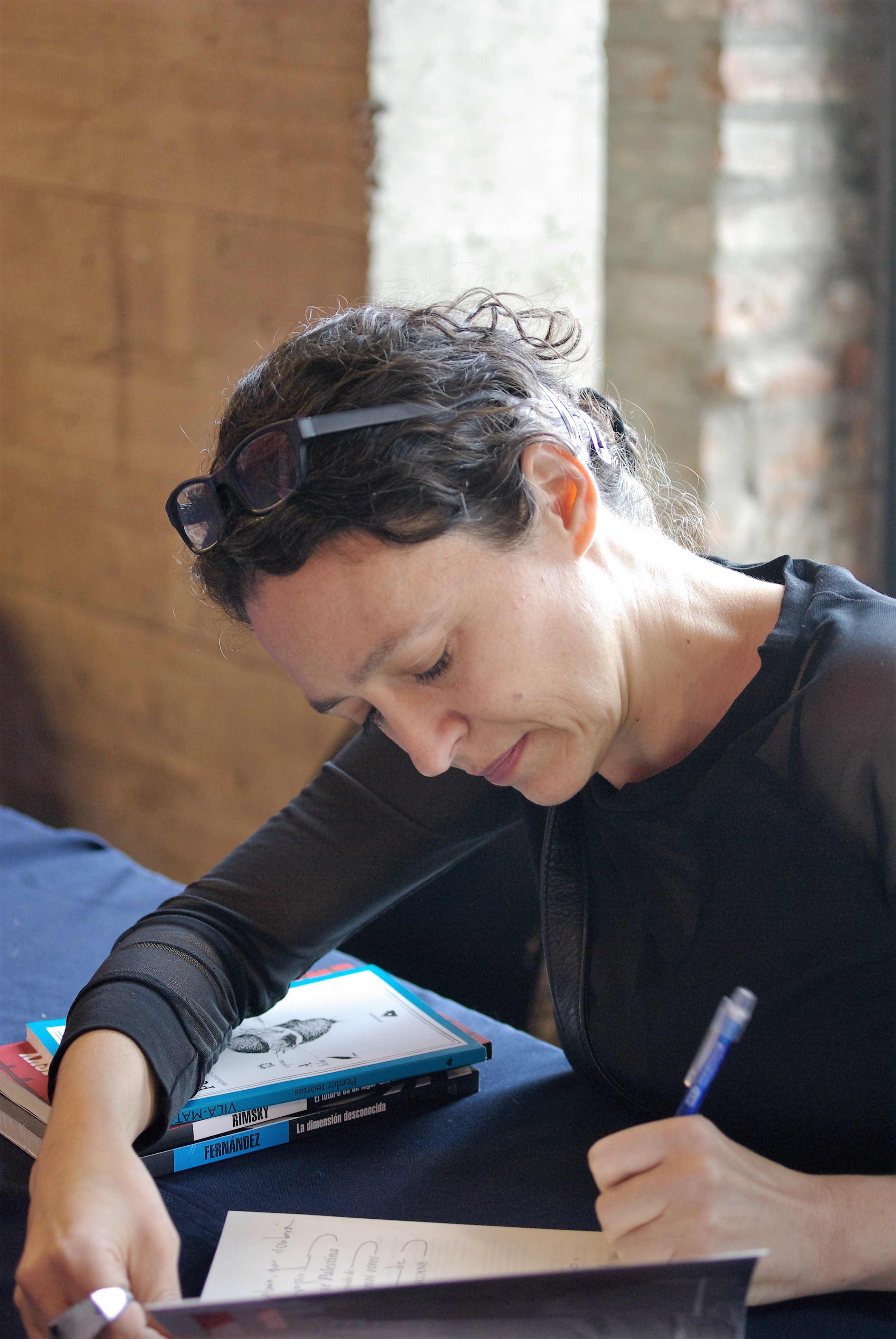 La escritora chilena Lina Meruane durante la firma de libros después del conversatorio Escribir a contrapelo, entrevista que le hace el poeta y profesor Enrique Winter en el marco del festival cultural Puerto de Ideas 2016, sala del Centro de Extensión Duoc UC de Valparaíso, sábado 12 de noviembre